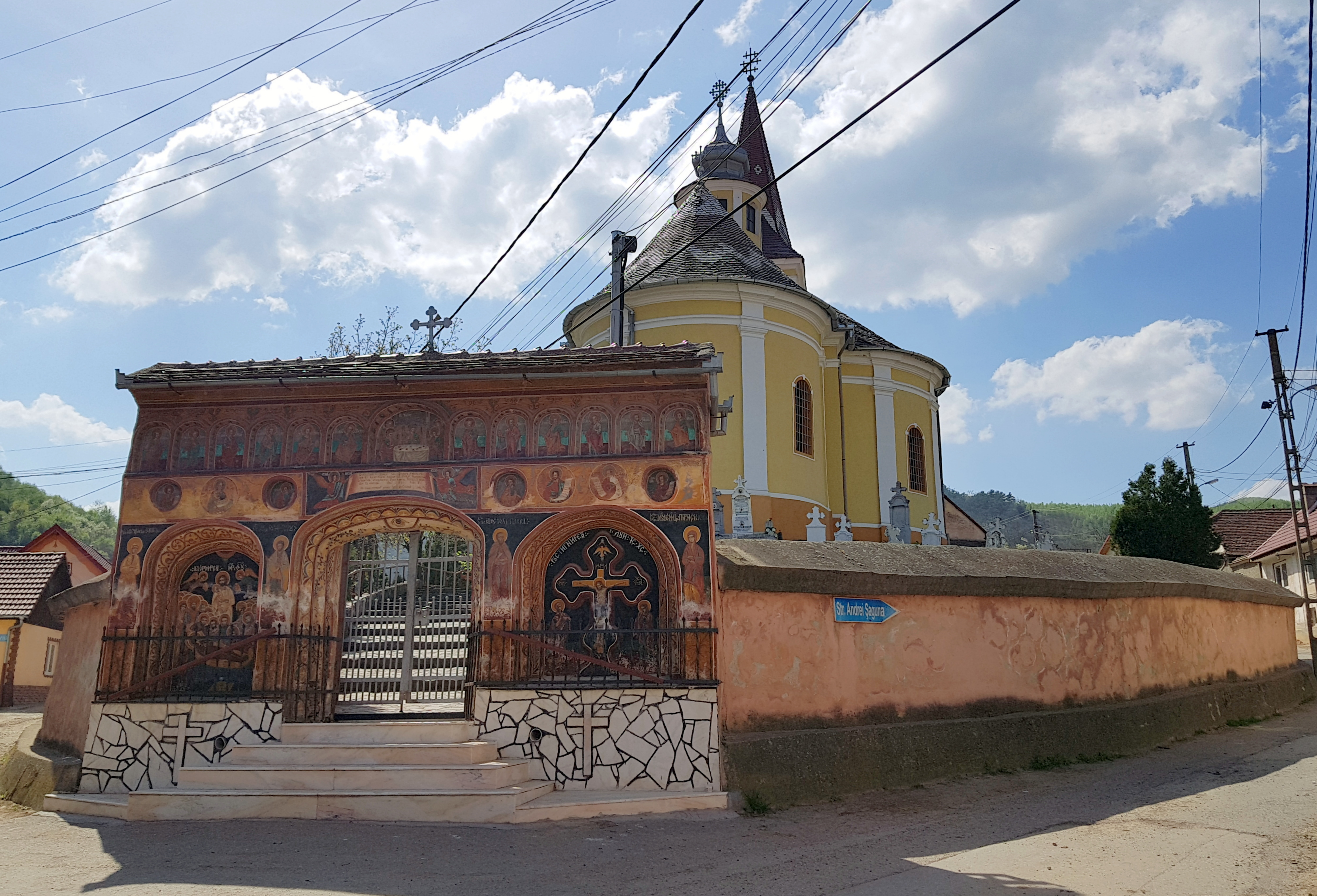 Biserica „Adormirea Maicii Domnului” 01